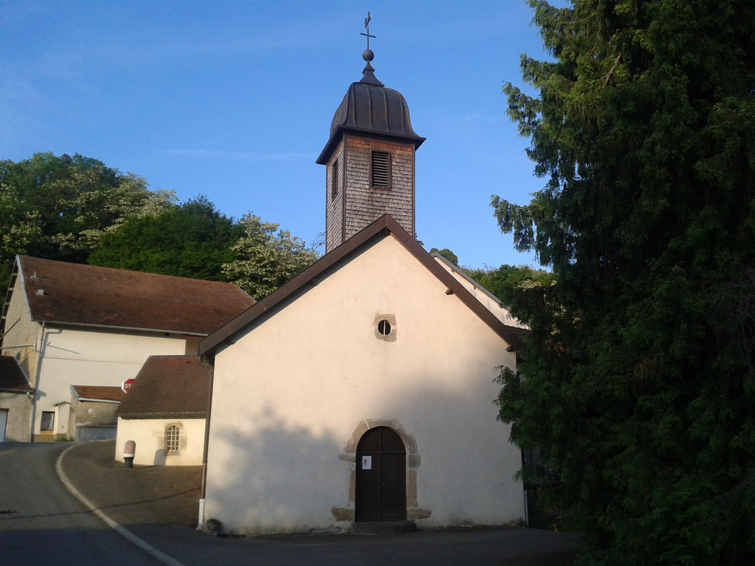 L'église de Villeparois